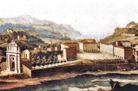 Huile sur toile de Cignaroli datée de 1782 représentant la place Garibaldi de Nice précédée en amont par la porte de Turin . Collection particulière.